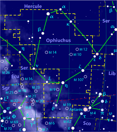 Carte pour la constellation d'Ophiuchus Produite à l'aide du logiciel PP3